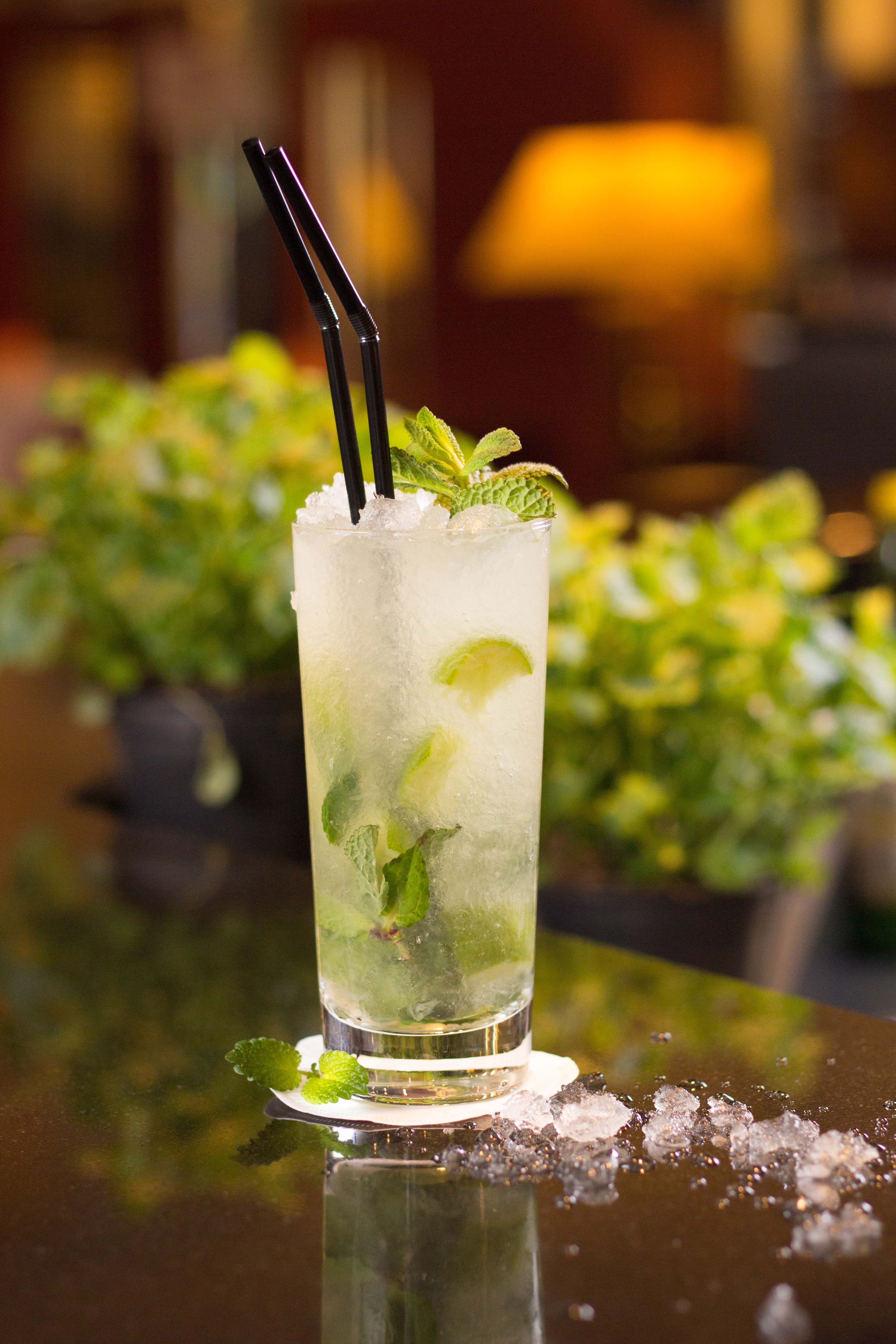 MelissA Mojito